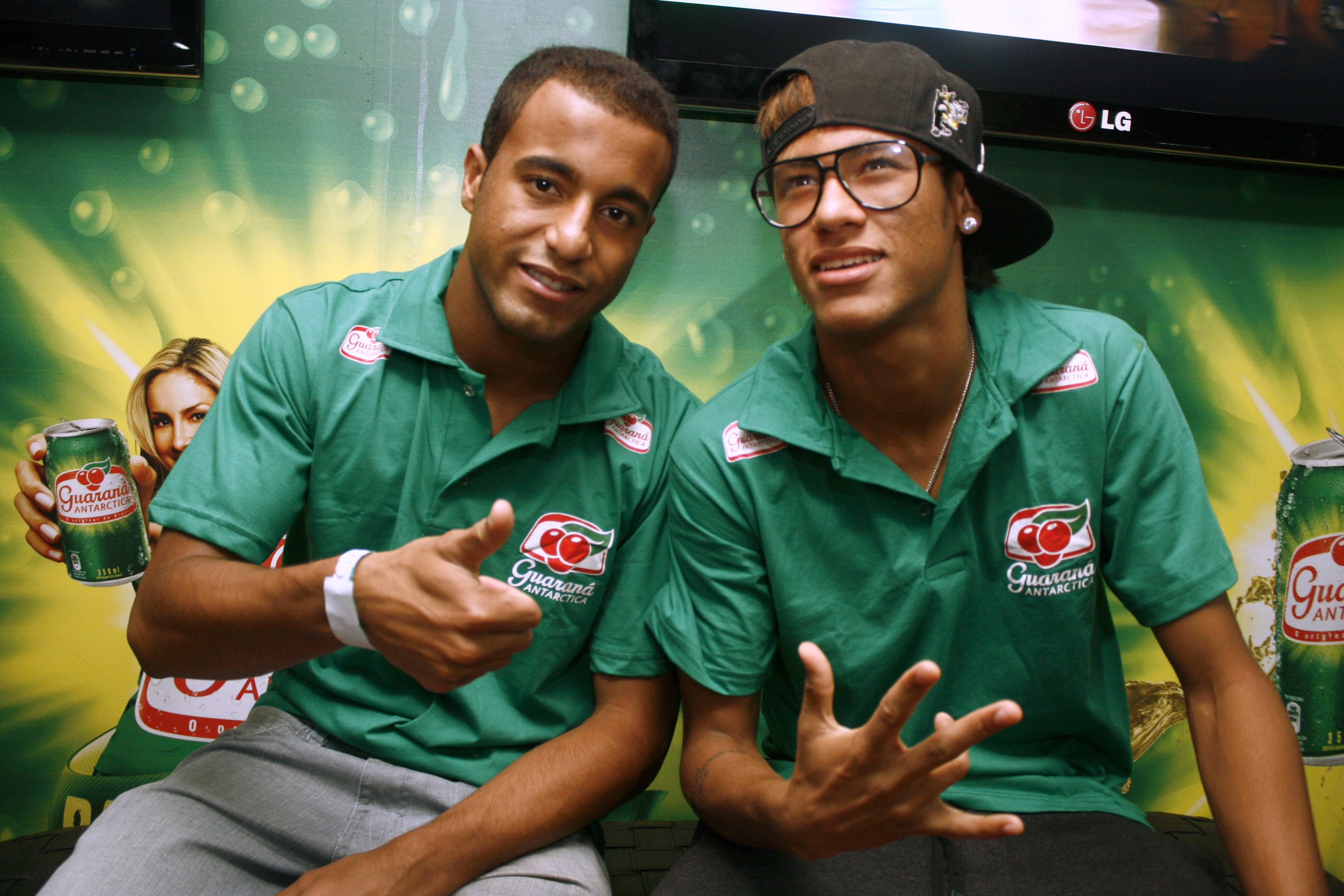 Lucas Rodrigues Moura da Silva e Neymar.